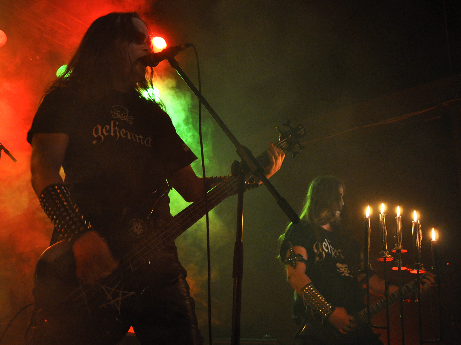 Gehenna au festival "Nacht der Drohenden Schatten" à la Halle 101 à Speyer (Ger), le 19 Février 2011.